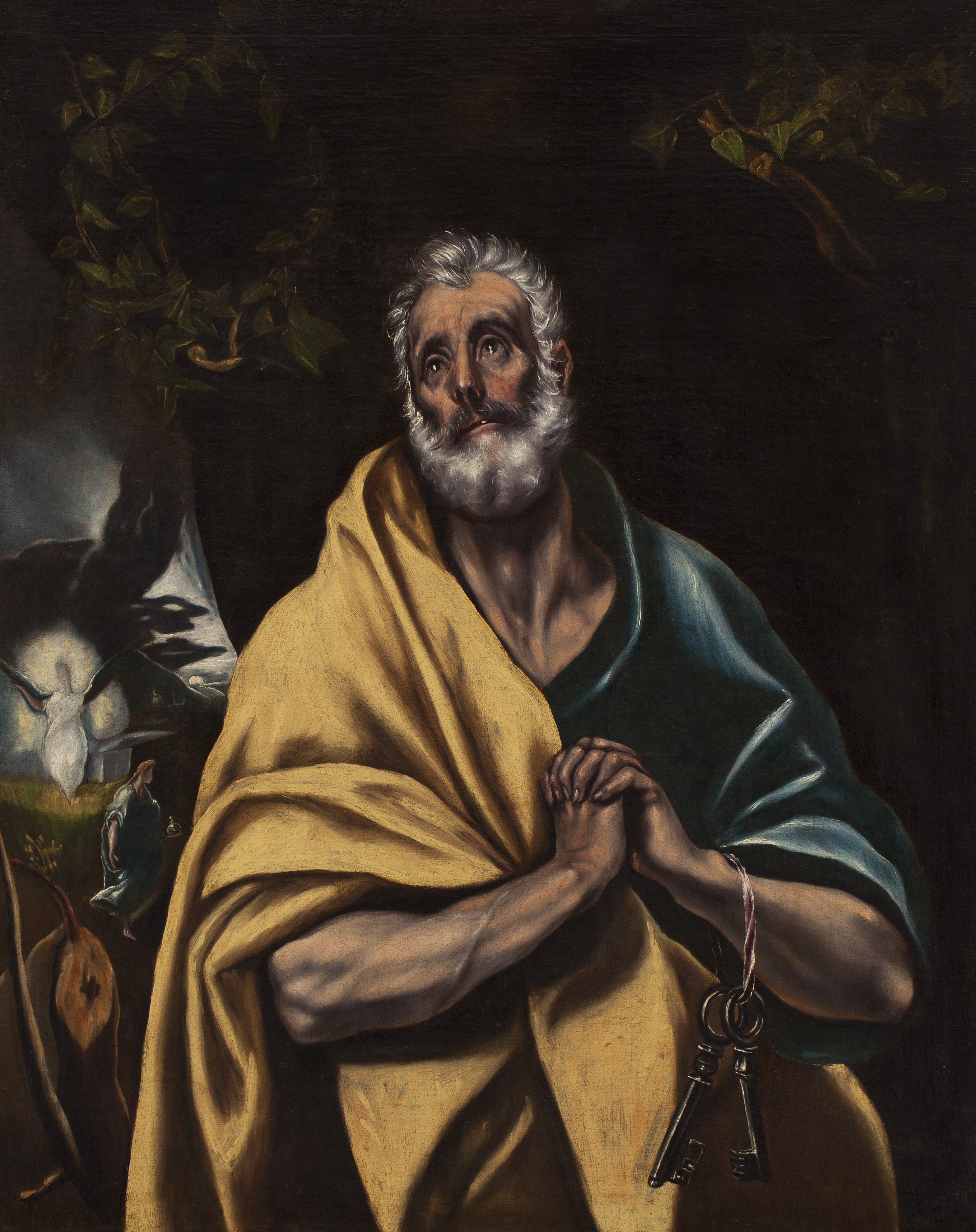 La obra representa al apóstol San Pedro, el primer papa de la Iglesia Católica, llorando y arrepintiéndose de haber negado a Jesucristo.